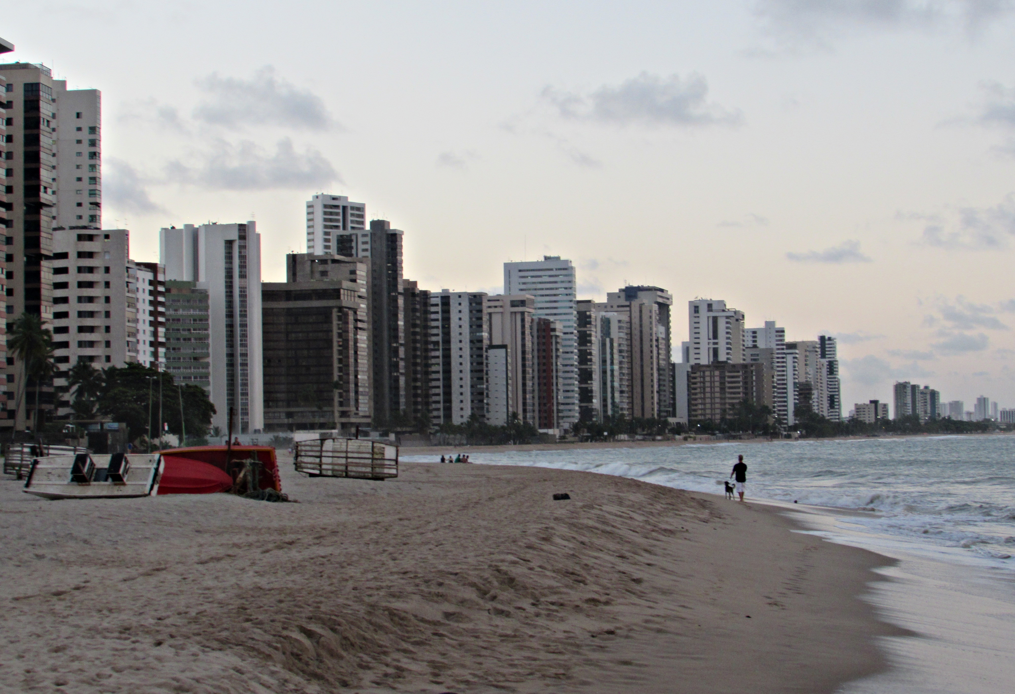 Orla de Piedade, Jaboatão dos Guararapes-PE